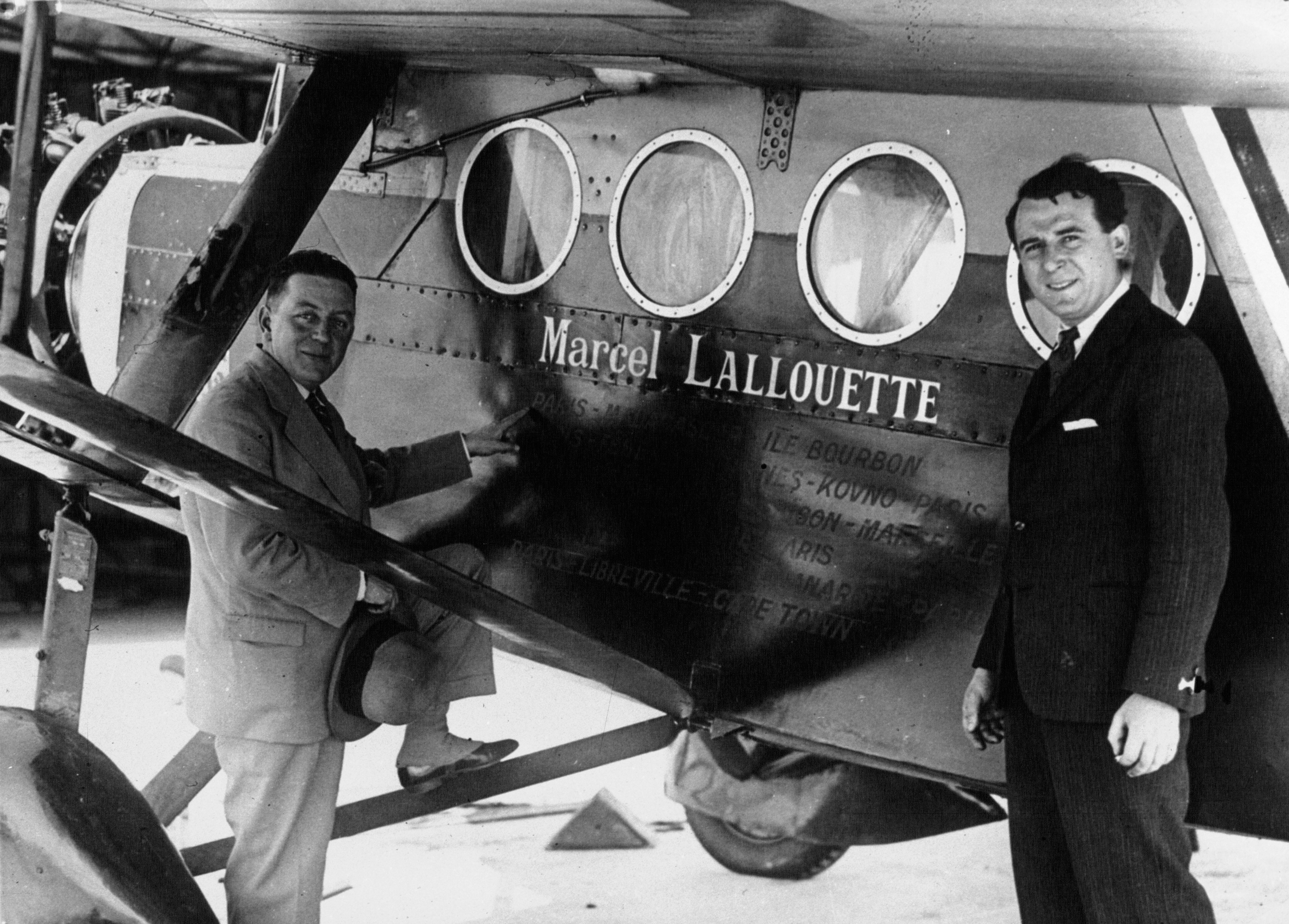 Les aviateurs français Goulette et André Salel